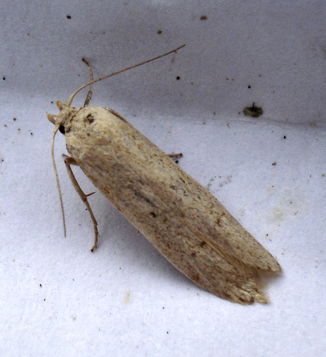 Blastobasis lacticolella